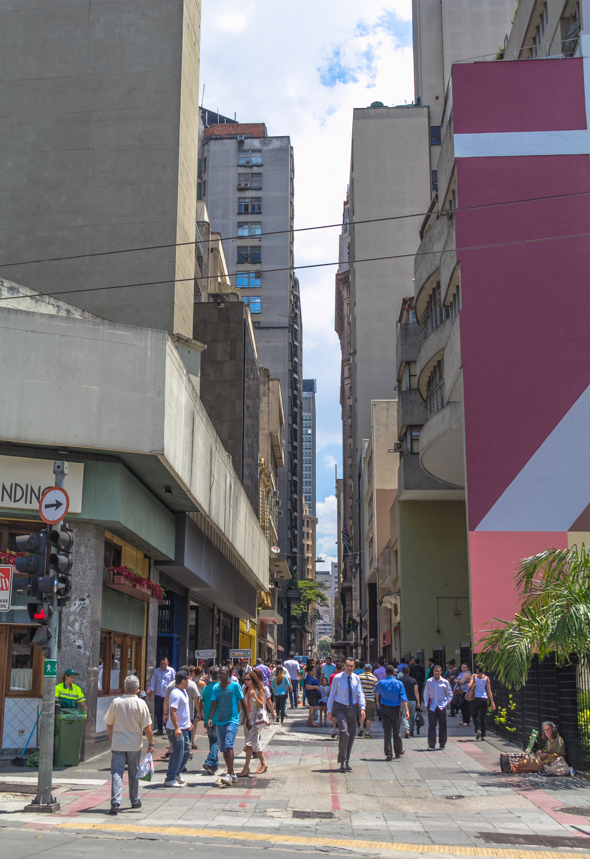 Rua Sao Bento,metro